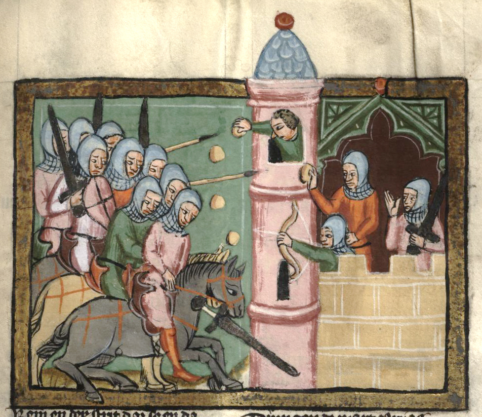 Rudolf von Ems: Weltchronik. Böhmen (Prag), 3. Viertel 14. Jahrhundert. Hochschul- und Landesbibliothek Fulda, Aa 88. Bildbeschreibung nach Martin Roland. Miniatur 169 274r Urija fällt bei der Belagerung Rabbas